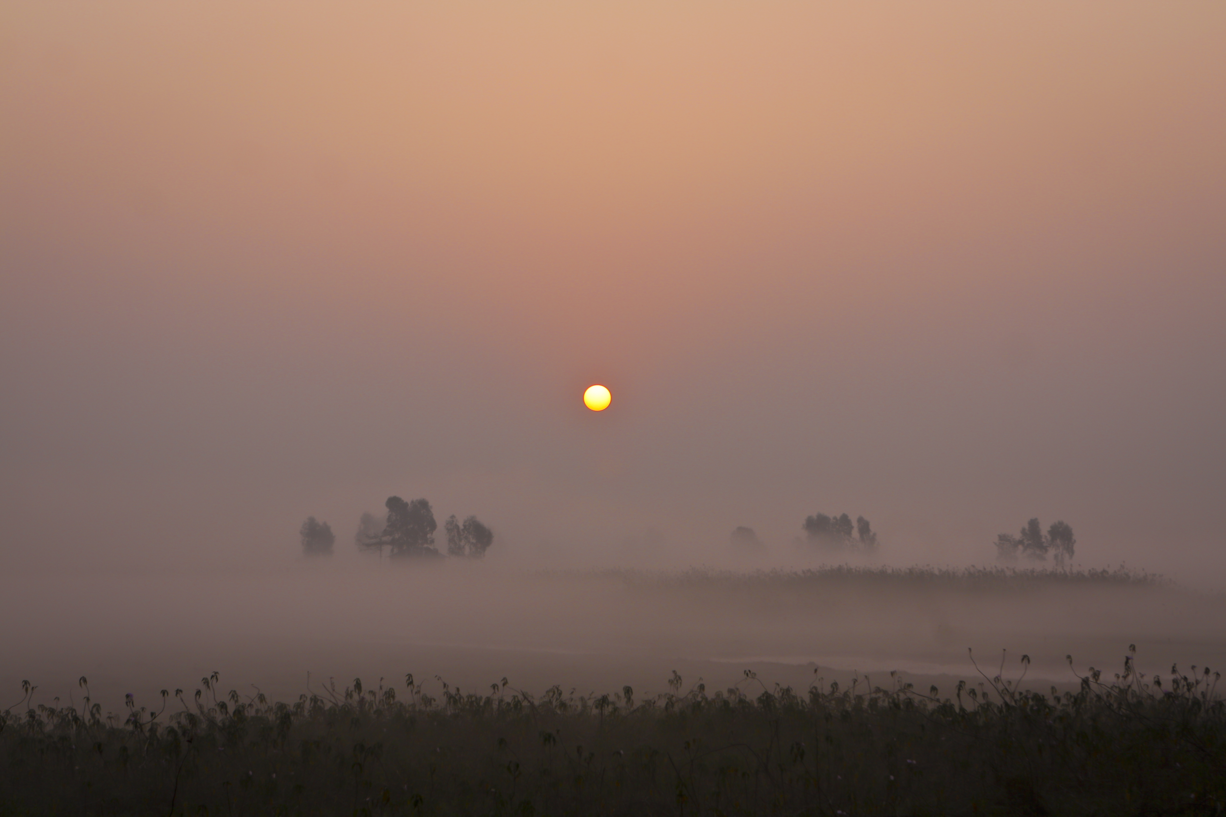 Sunrise at Baikka Bil, Srimangal, Moulvibazar